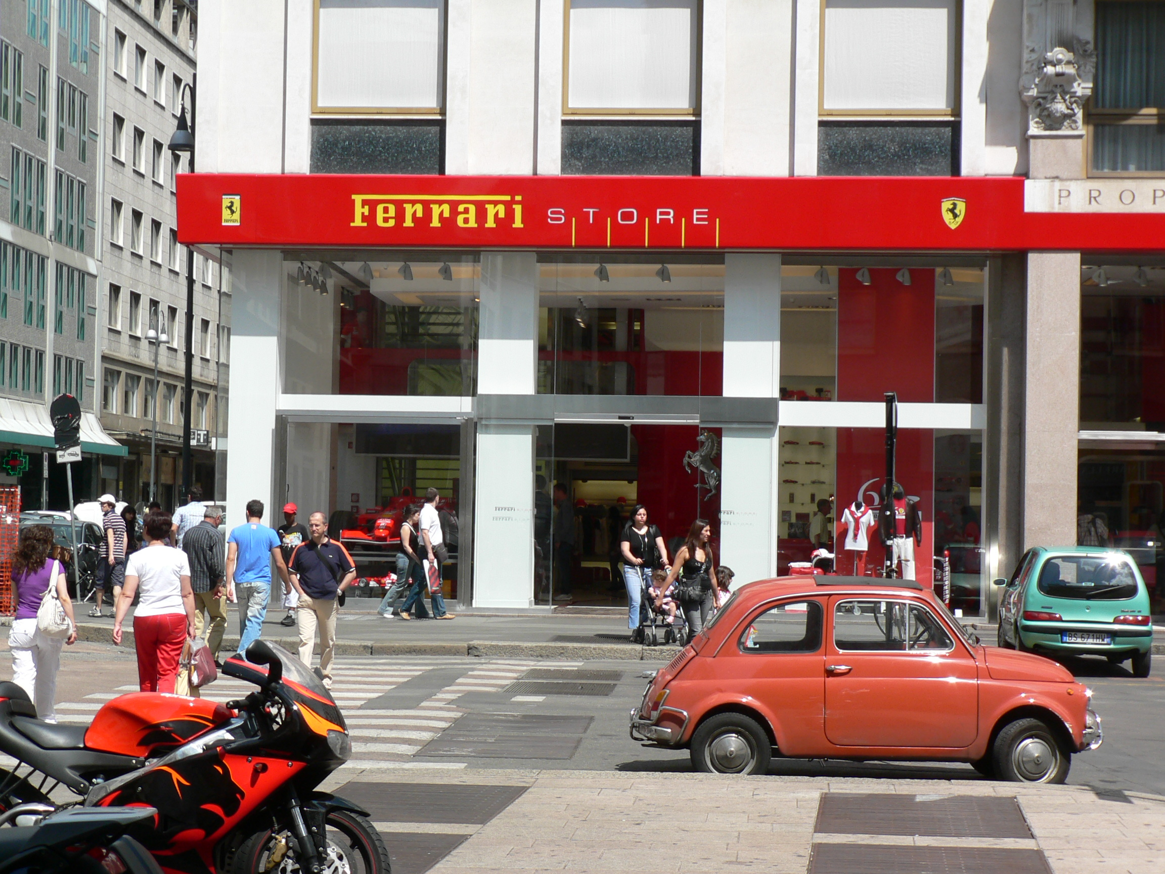 "Ferrari Store" in Piazzetta del Liberty a Milano.